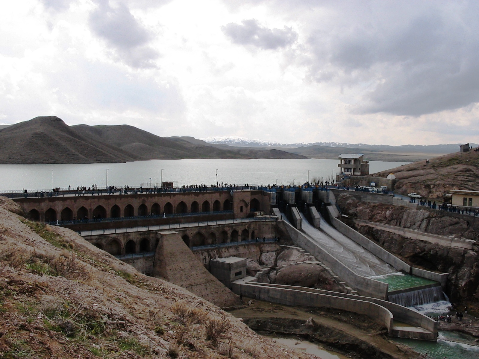 بند فریمان